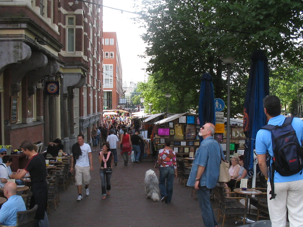 Fleemarket, Waterlooplein, Amsterdam